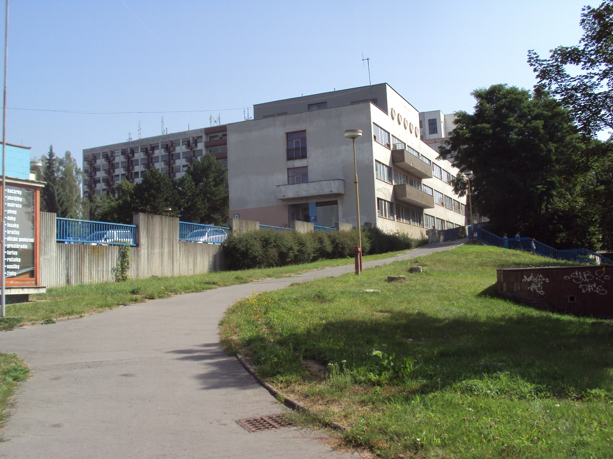 Nemocnice v České Lípě